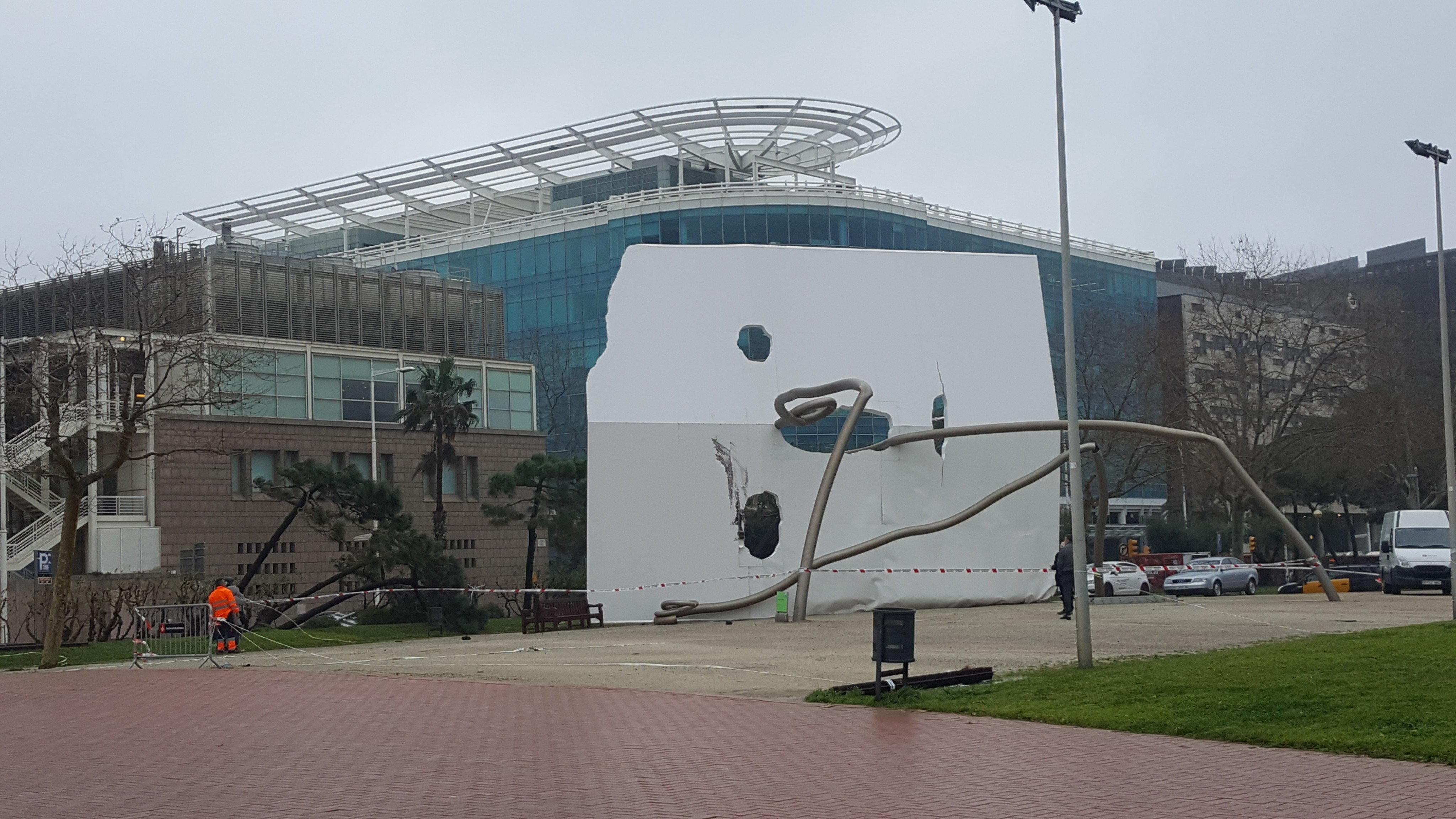 Monument David i Goliat de Vila Olímpica, Barcelona caigut pels efectes del fort vent de la borrasca Gloria